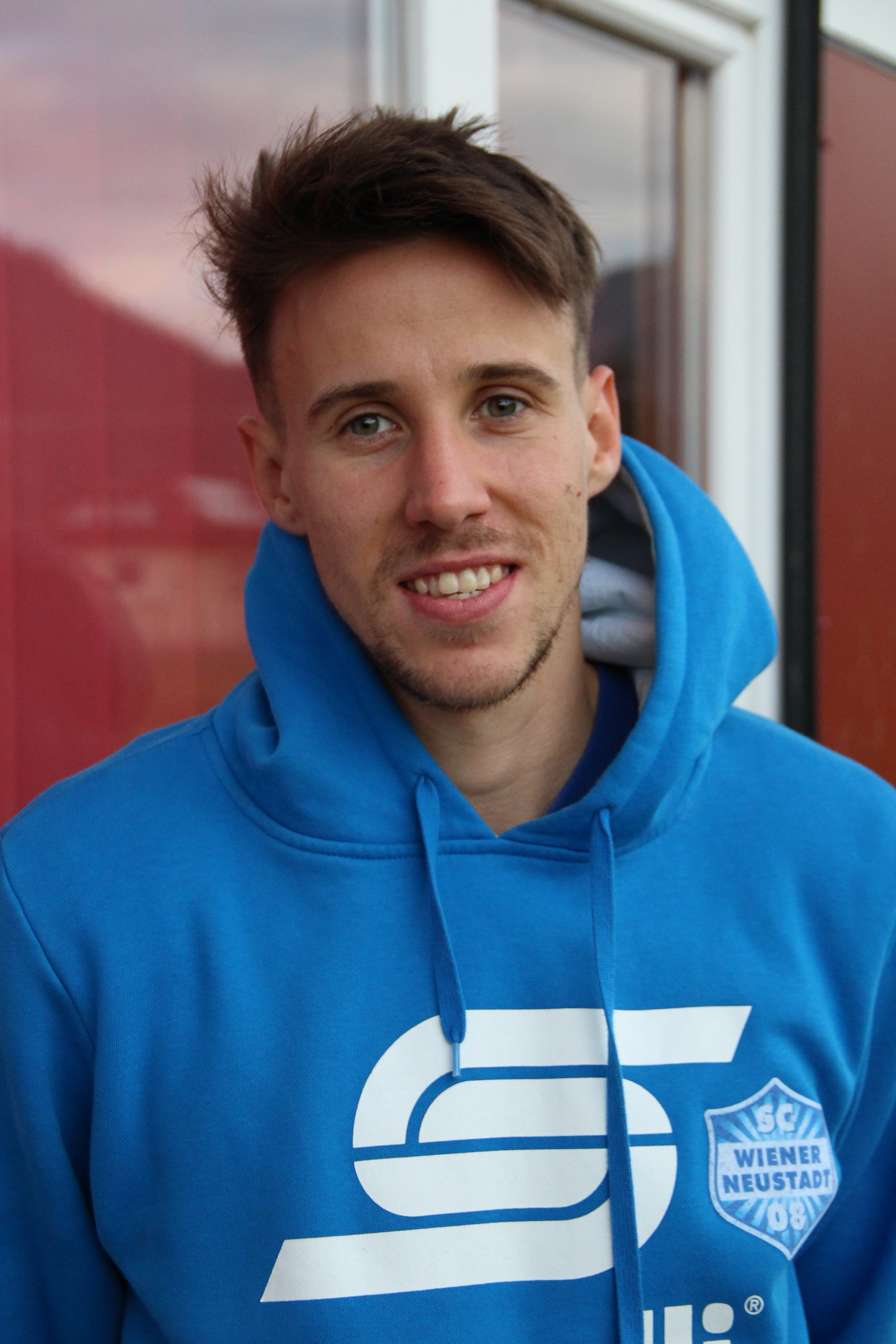 Filip Faletar (SCWN)